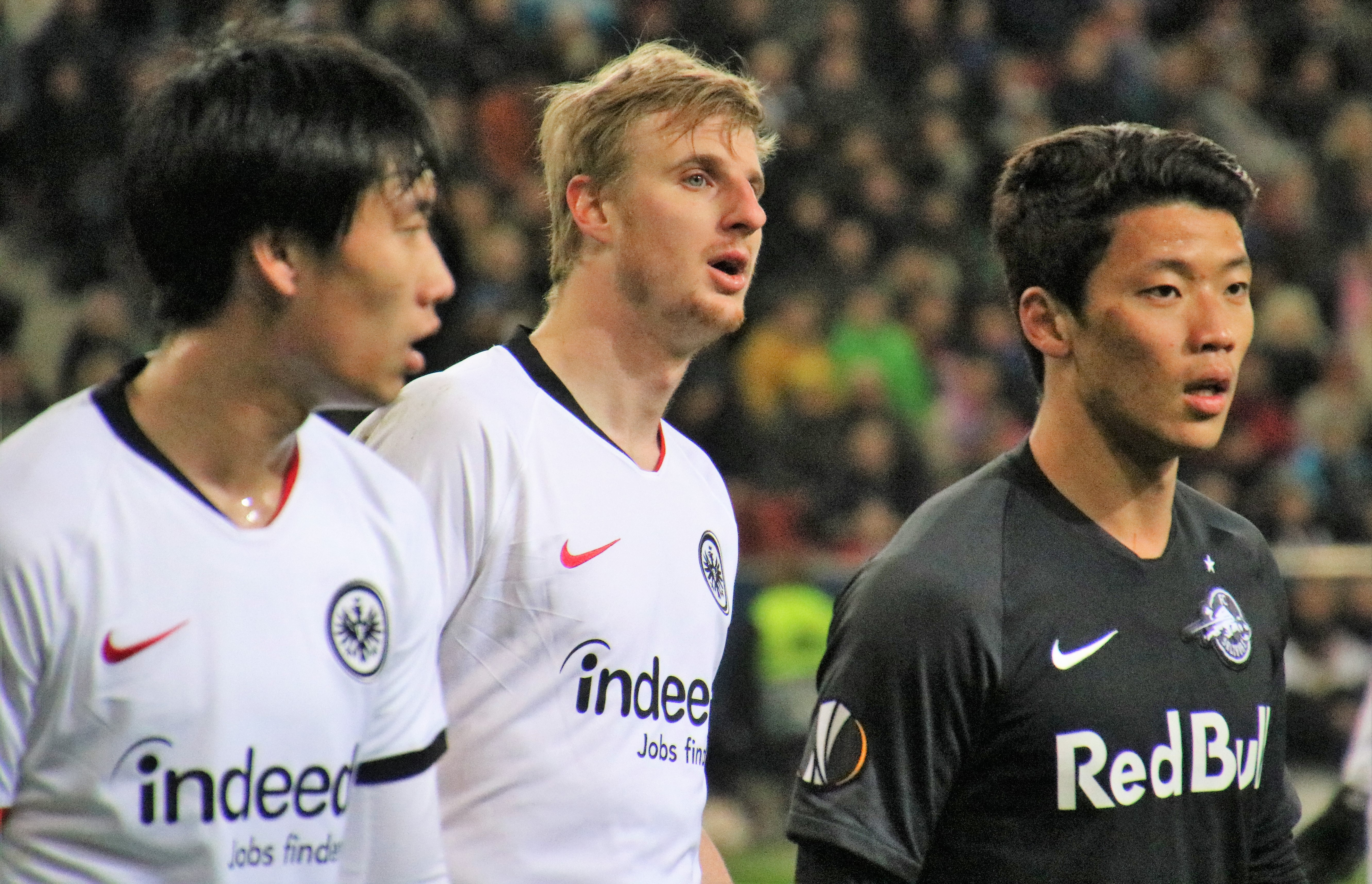 EL Sechzehntelfinale Rückspiel 2:2